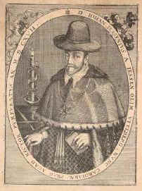 Der Arzt, Philosoph und Politiker Jan Jessenius (Namensformen: Jessenius de Magna Jessen, Ioannes Jesenius, Johannes Jessen, Ján Jesenský, Jan Jesenský, Jan Jesensky a Jesen, 1566-1621)